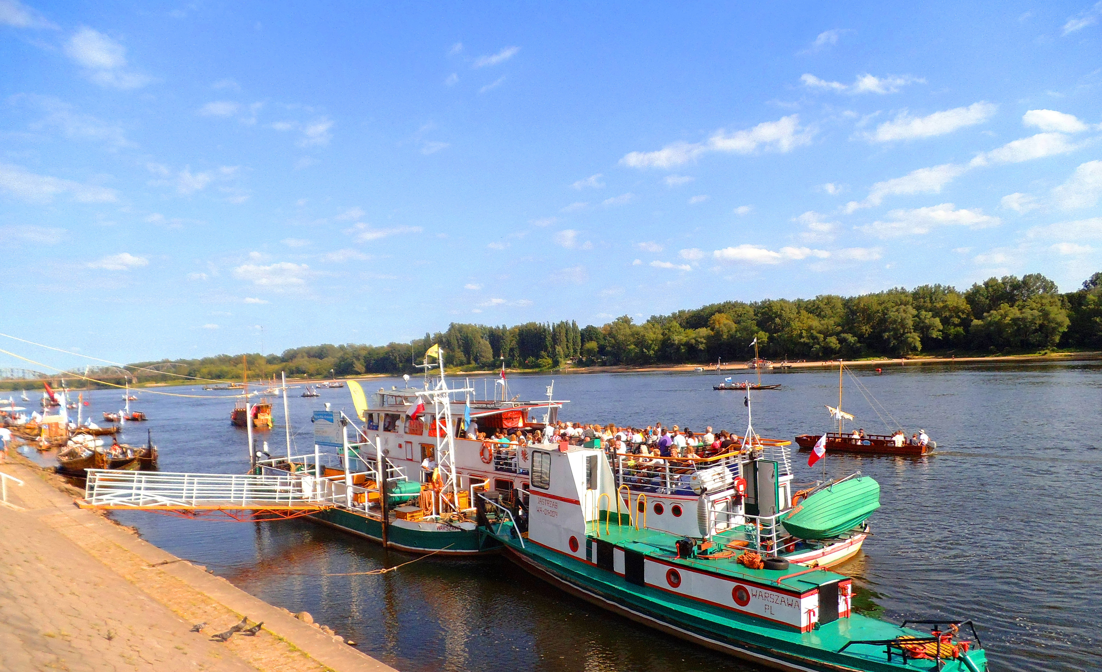 Statek Wanda w Toruniu